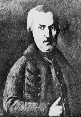 Aranka Györgyről készült olajkép.